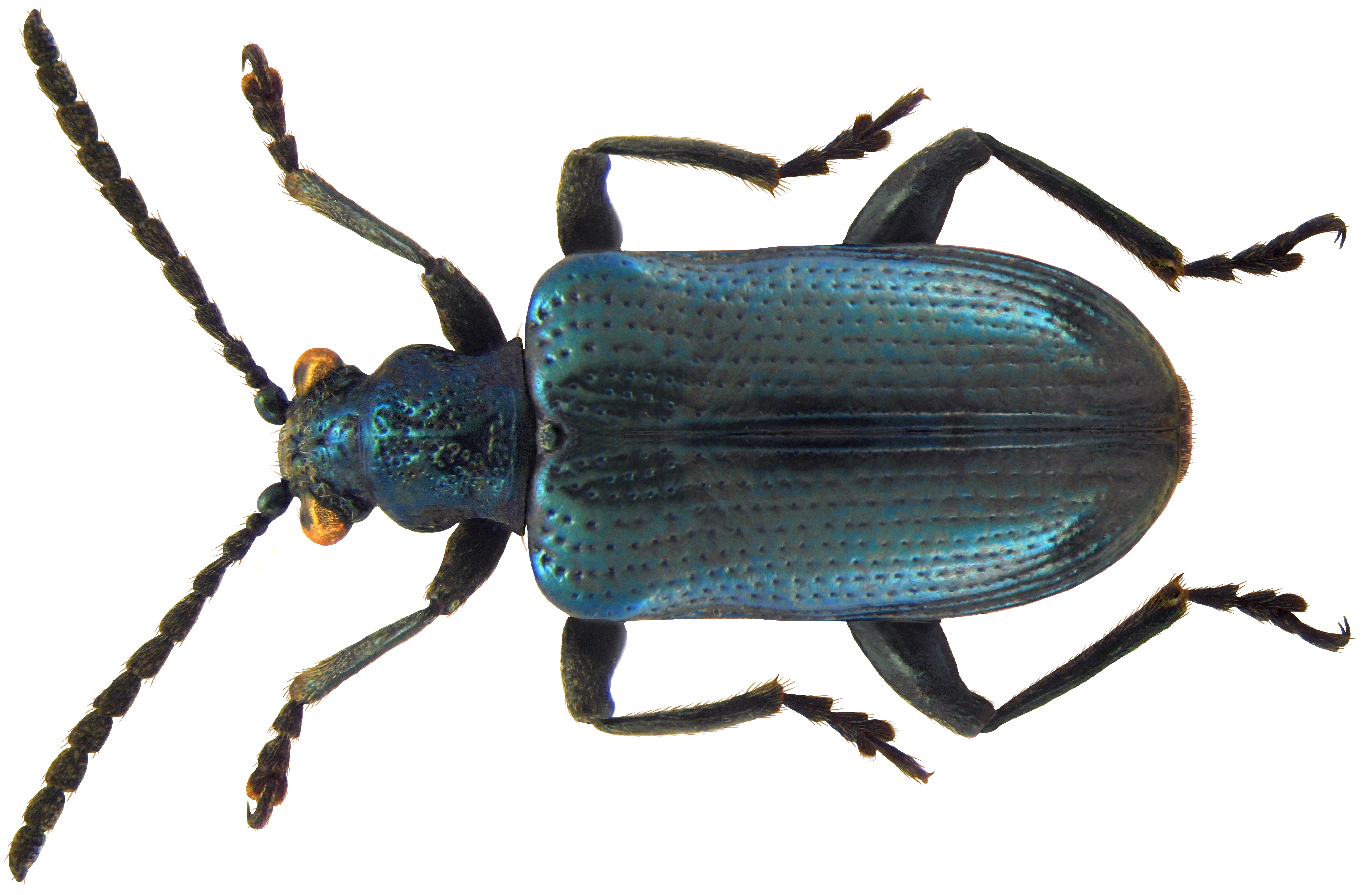 Lema cyanella (Linné, 1758) Familie: Chrysomelidae Groesse: 4-5,5 mm Verbreitung: Europa Ökologie: an Cirsium-Arten Fundort: Germania, Bayern, Oberfranken, Selbitz leg. det. U.Schmidt, 1973 Photo: U.Schmidt, 2010